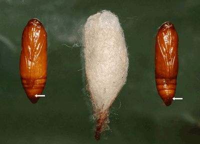 Cactoblastis cactorum Female pupa, cocoon and male pupa